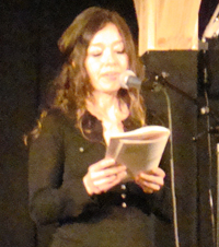 Forfatteren Ditte Steensballe optræder i 2009